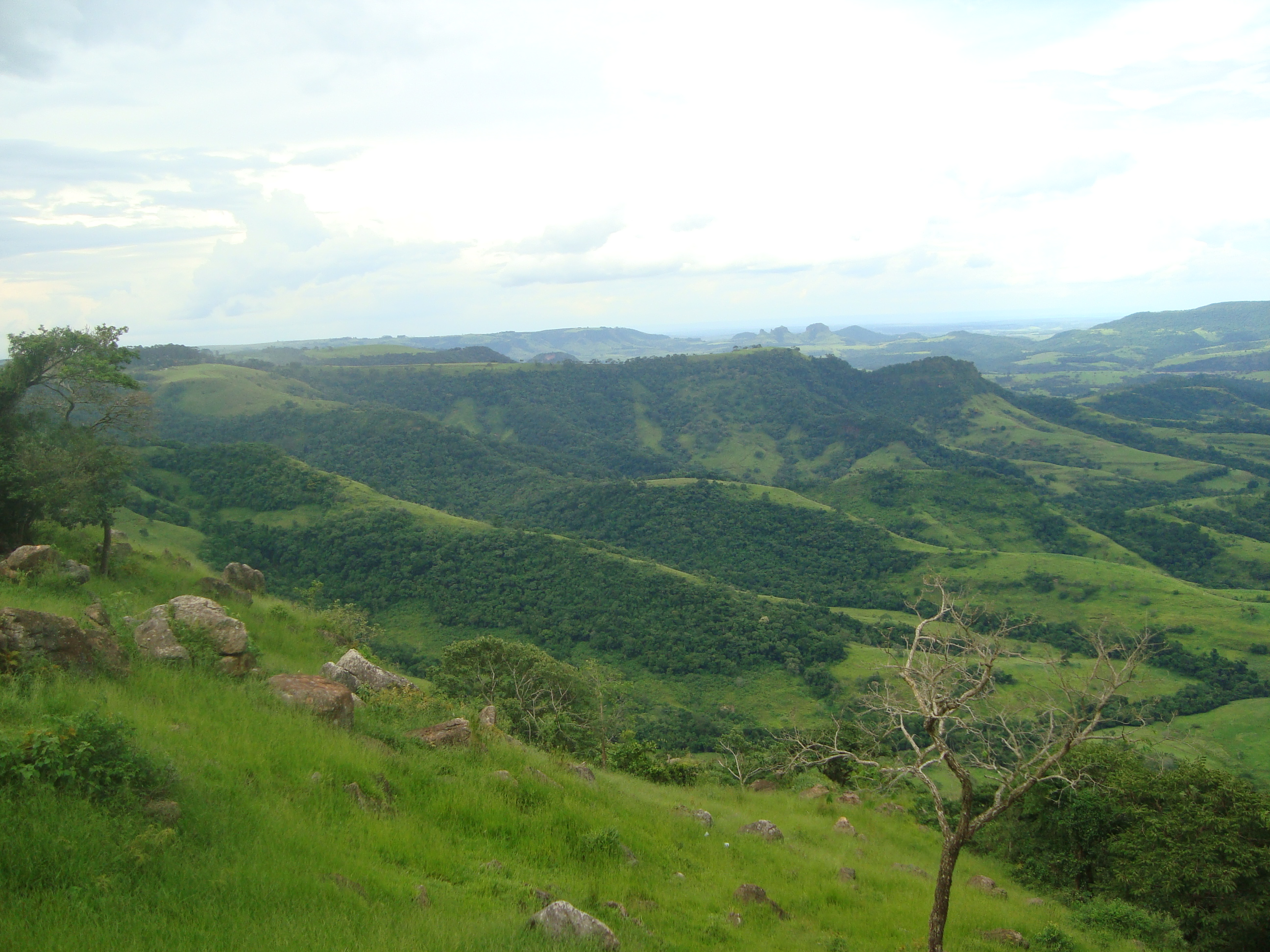 CuestaBotucatu